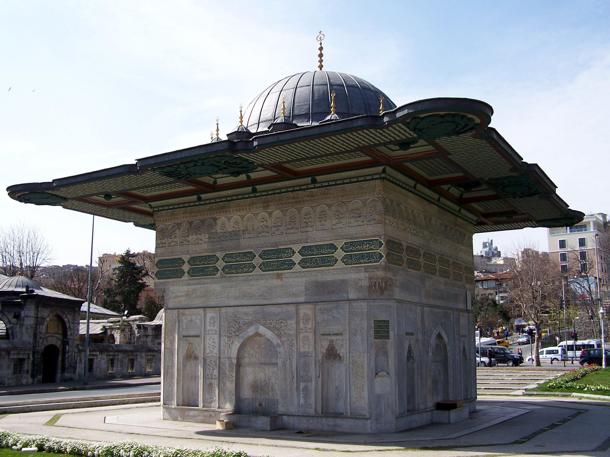 Tophane Çeşmesi near Kılıç Ali Paşa Camii in Tophane-Beyoğlu.